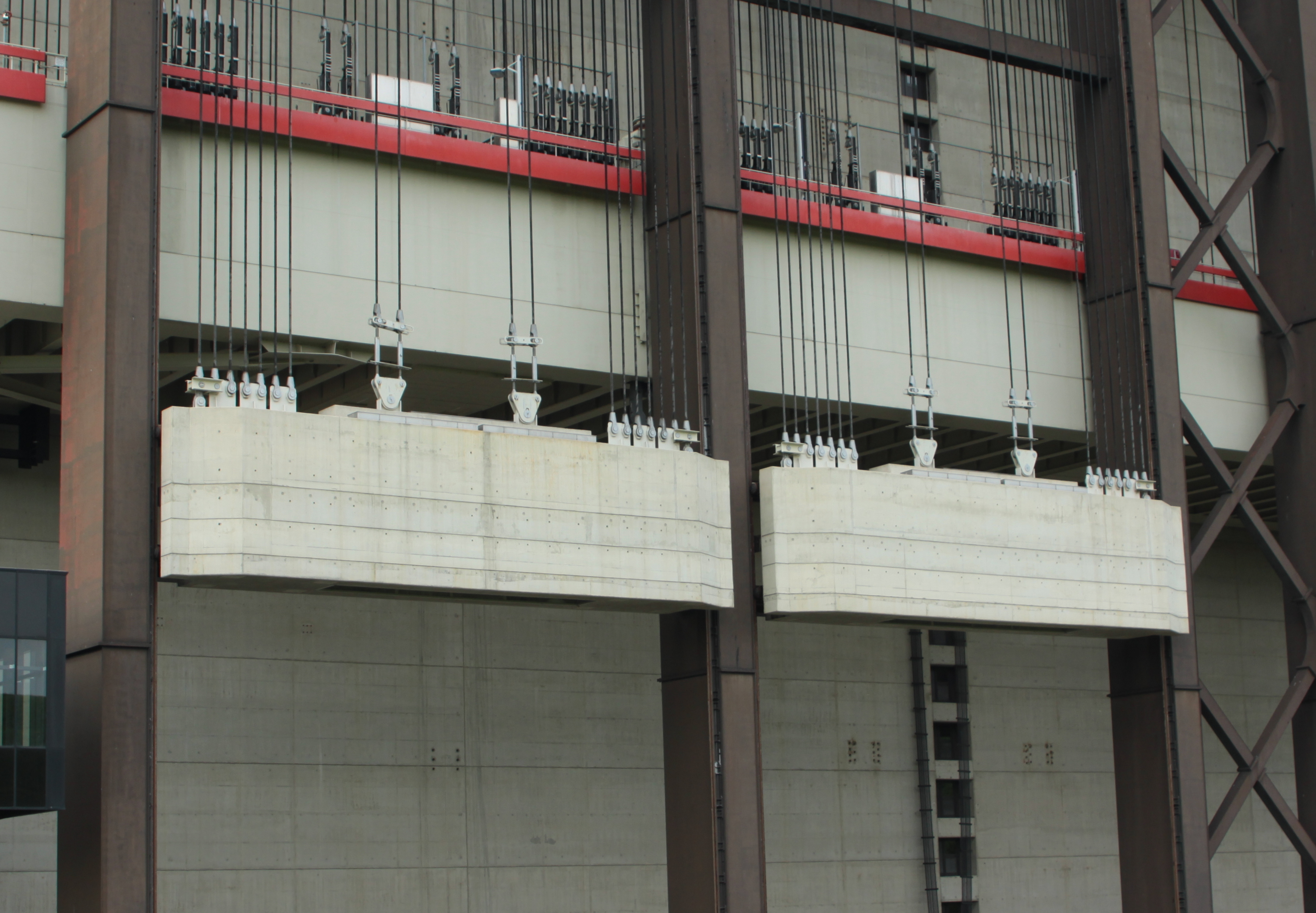 Kontergewiichter vum Schëffslift um Canal du Centre